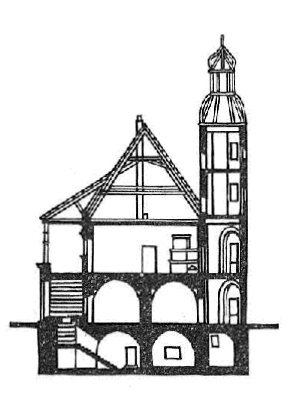 Разрэз Быхаўскага замка